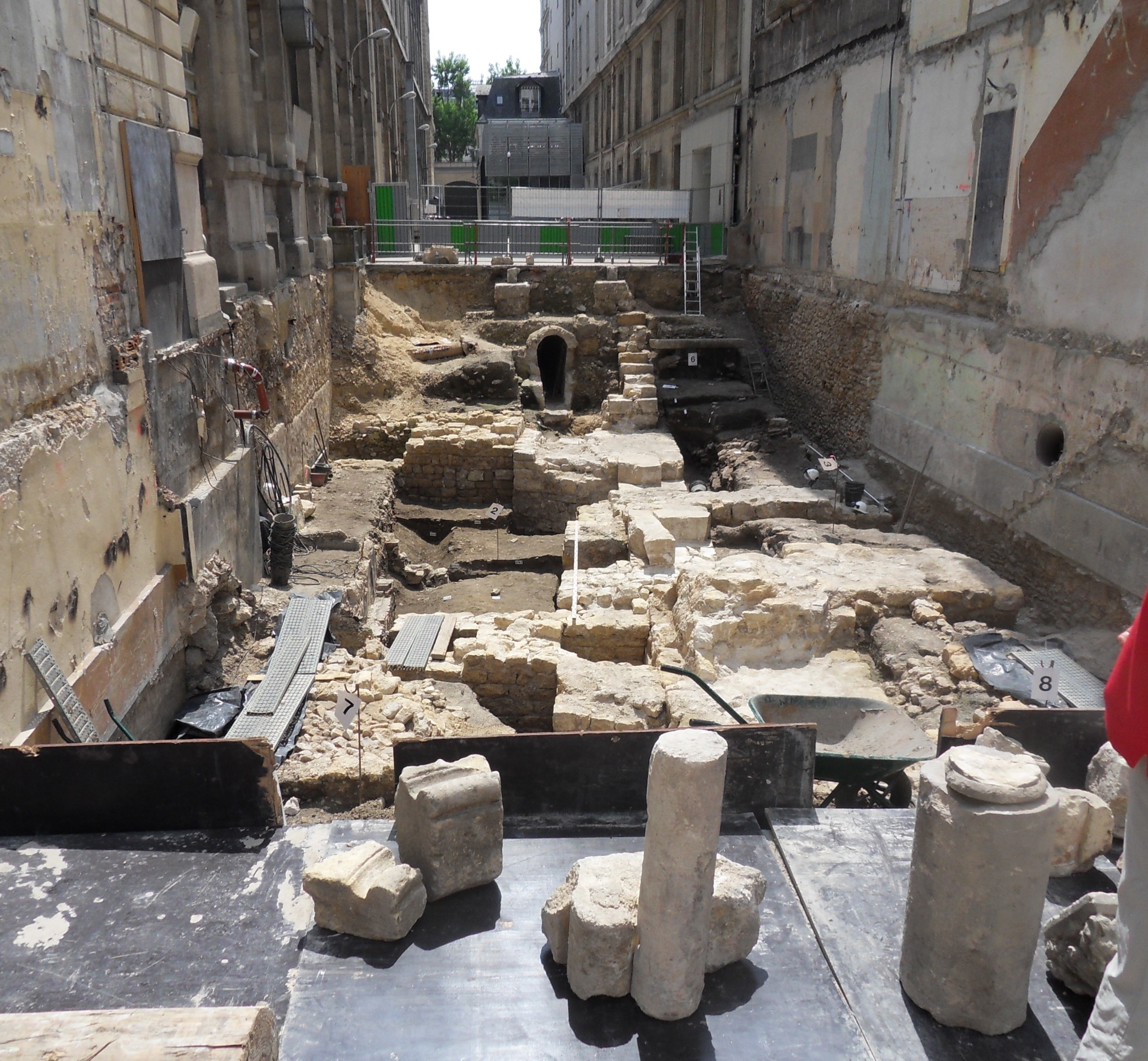 Vue générale des fouilles de l'église Saint-Éloi à Paris.